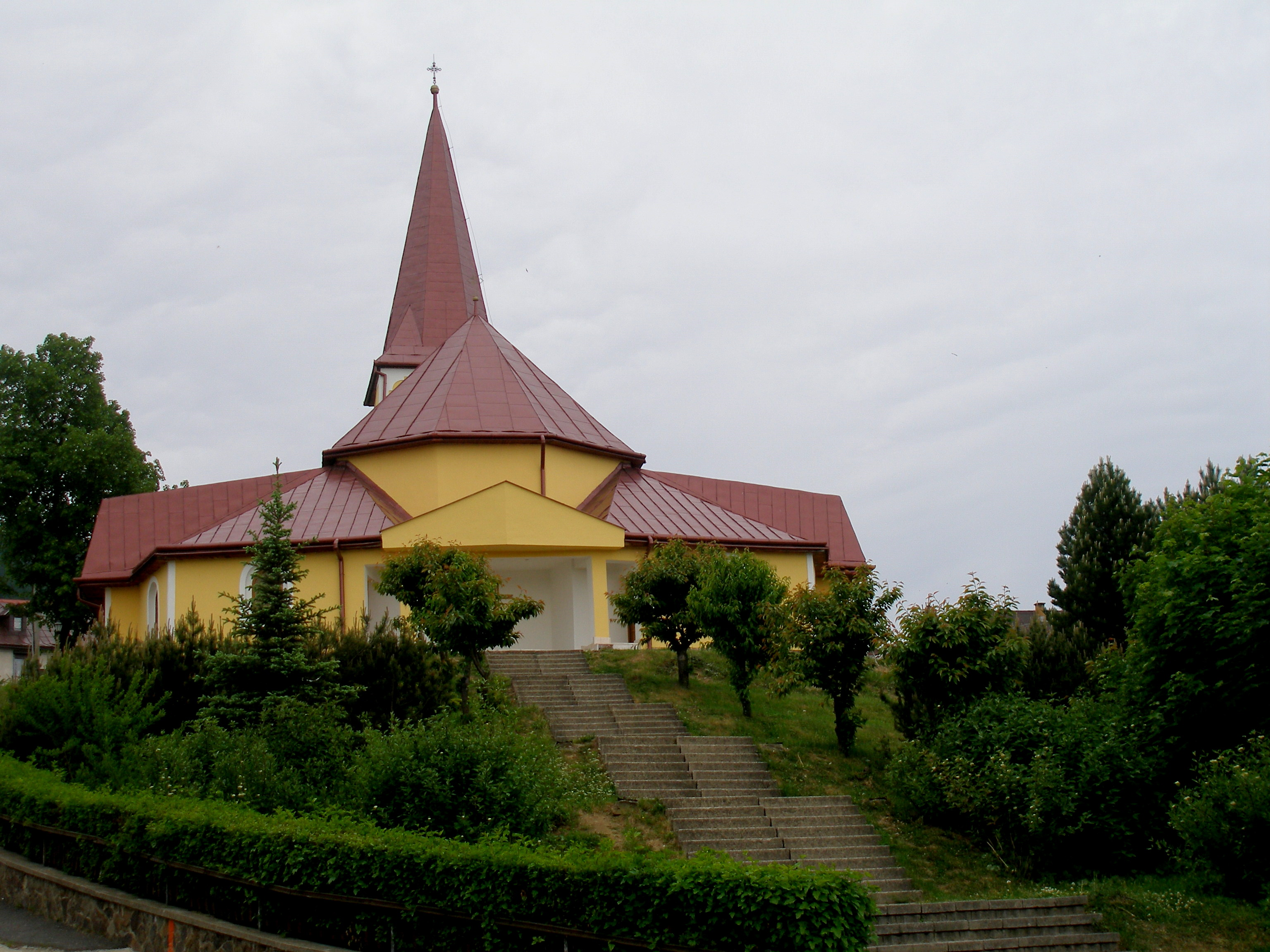 Obec Poloma okres Sabinov